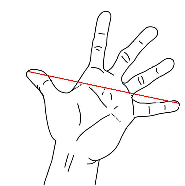 Handspanne (Große Spanne).